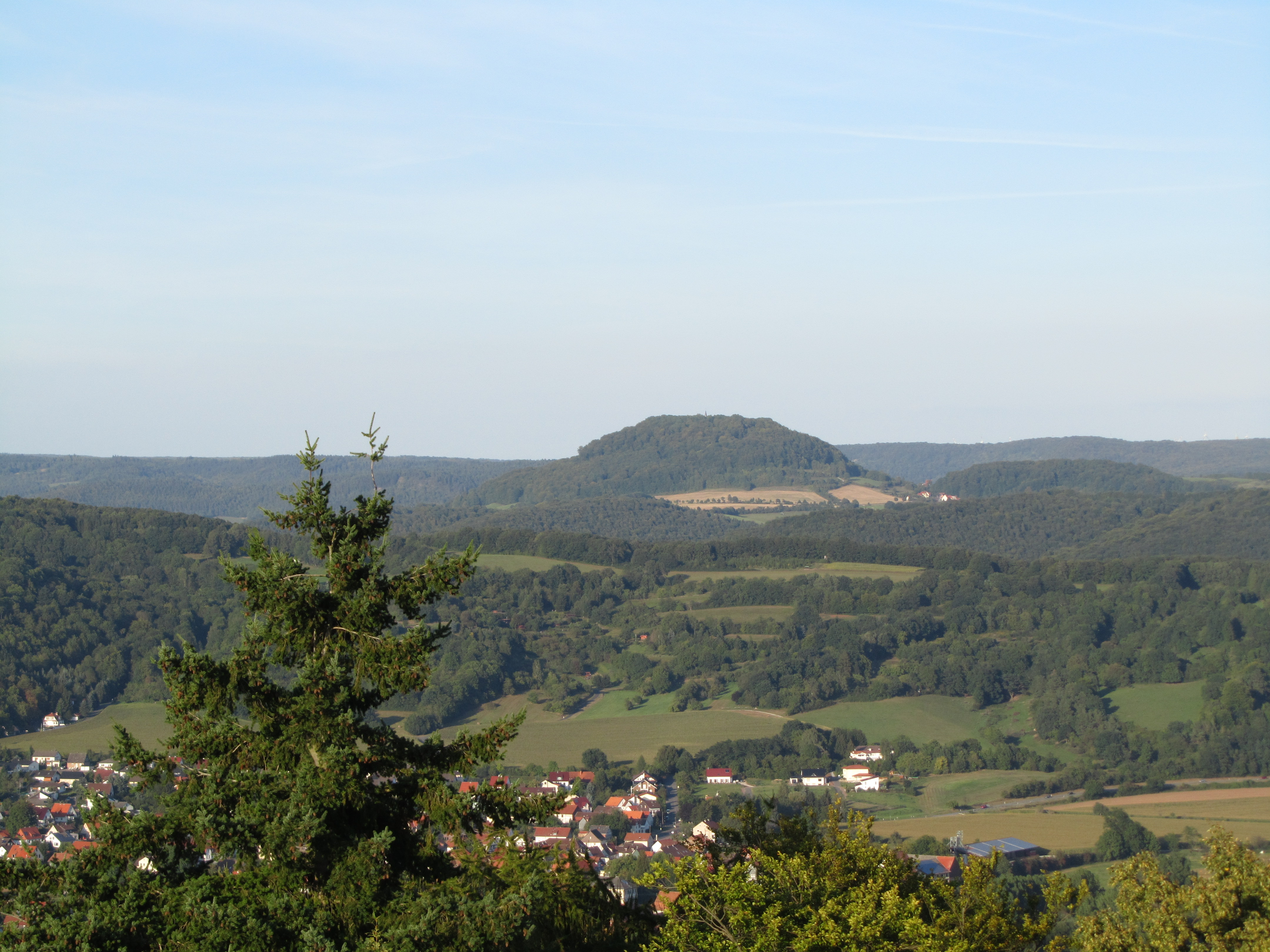 Der Hülfensberg von Südwesten, gesehen vom Bismarckturm auf dem Großen Leuchtberg. Im Werratal die Ortschaft Schwebda, dahinter der Kahlenberg, rechts unterhalb des Hülfensberges ein Teil von Bebendorf, im Hintergrund die Höhen des Obereichsfeldes (links der Westerwald und rechts der Uhlenstein)